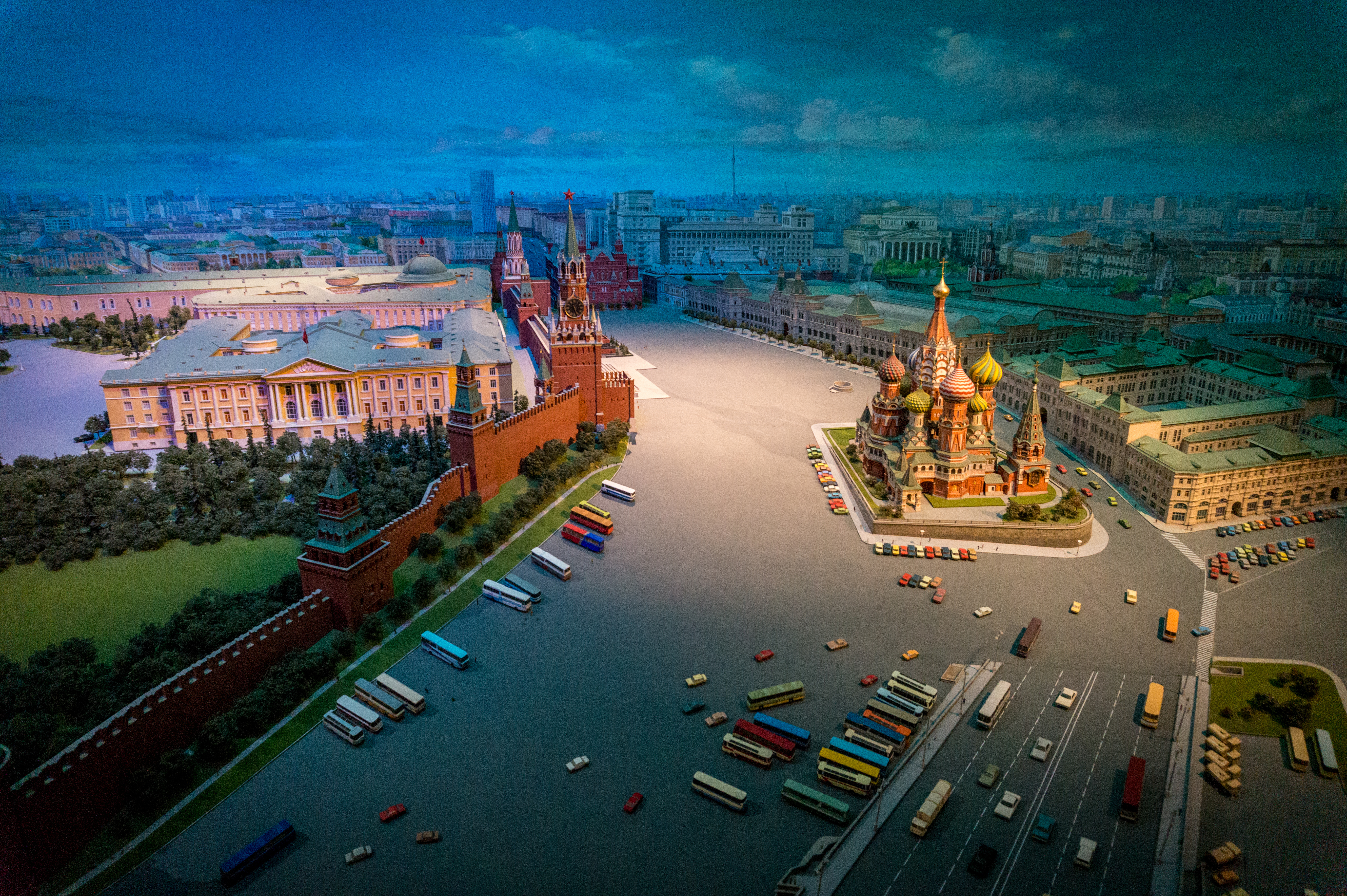 Diorama in Hotel Ukraine